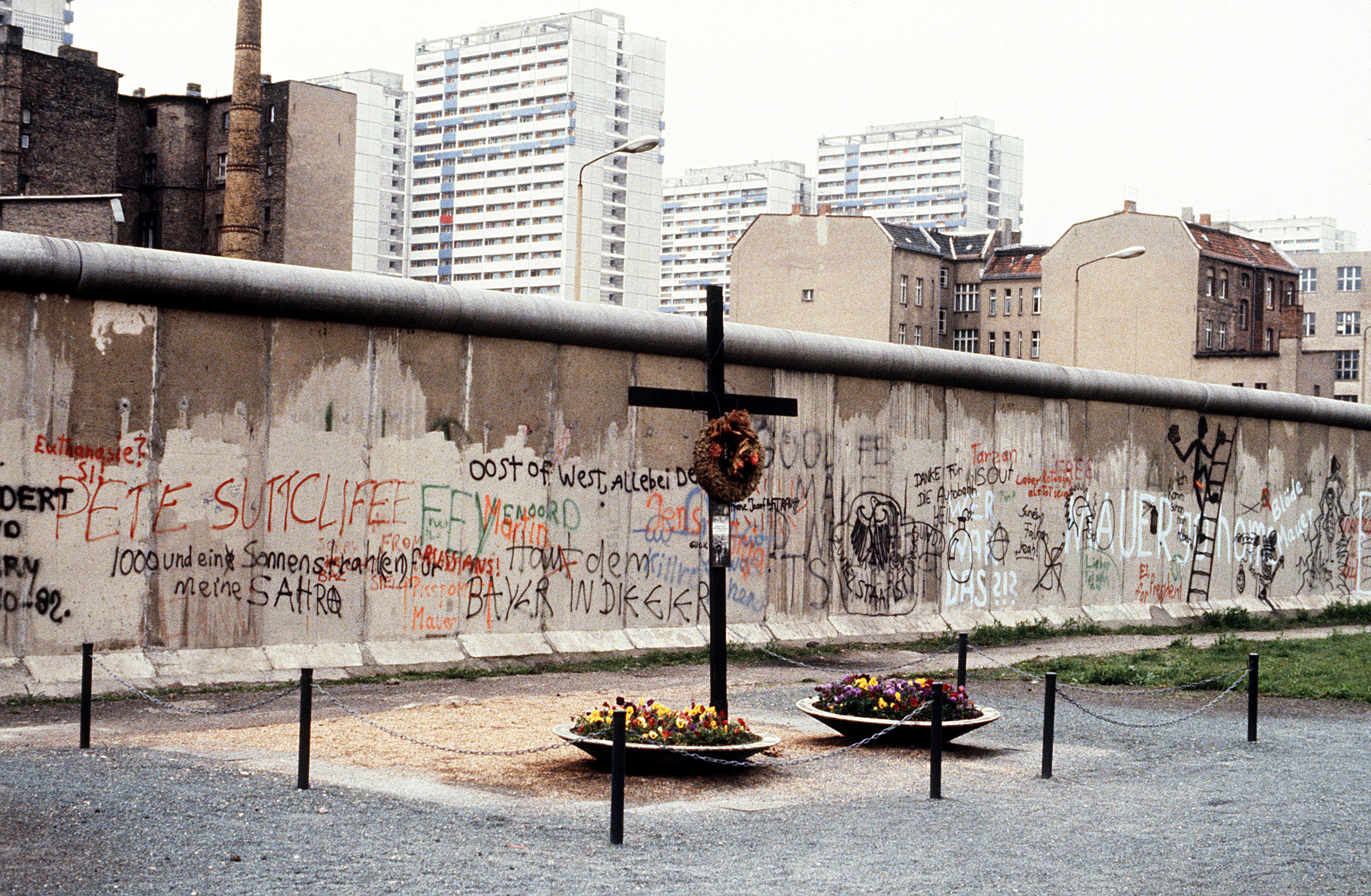 Gedenkstätte an den Opfer der Berliner Mauer, Peter Fechter, Aufnahme 1. Mai 1984. Originaltext: A memorial on the western side of the Berlin Wall dedicated to Peter Fecter, a young man who died while attempting to flee East Berlin.